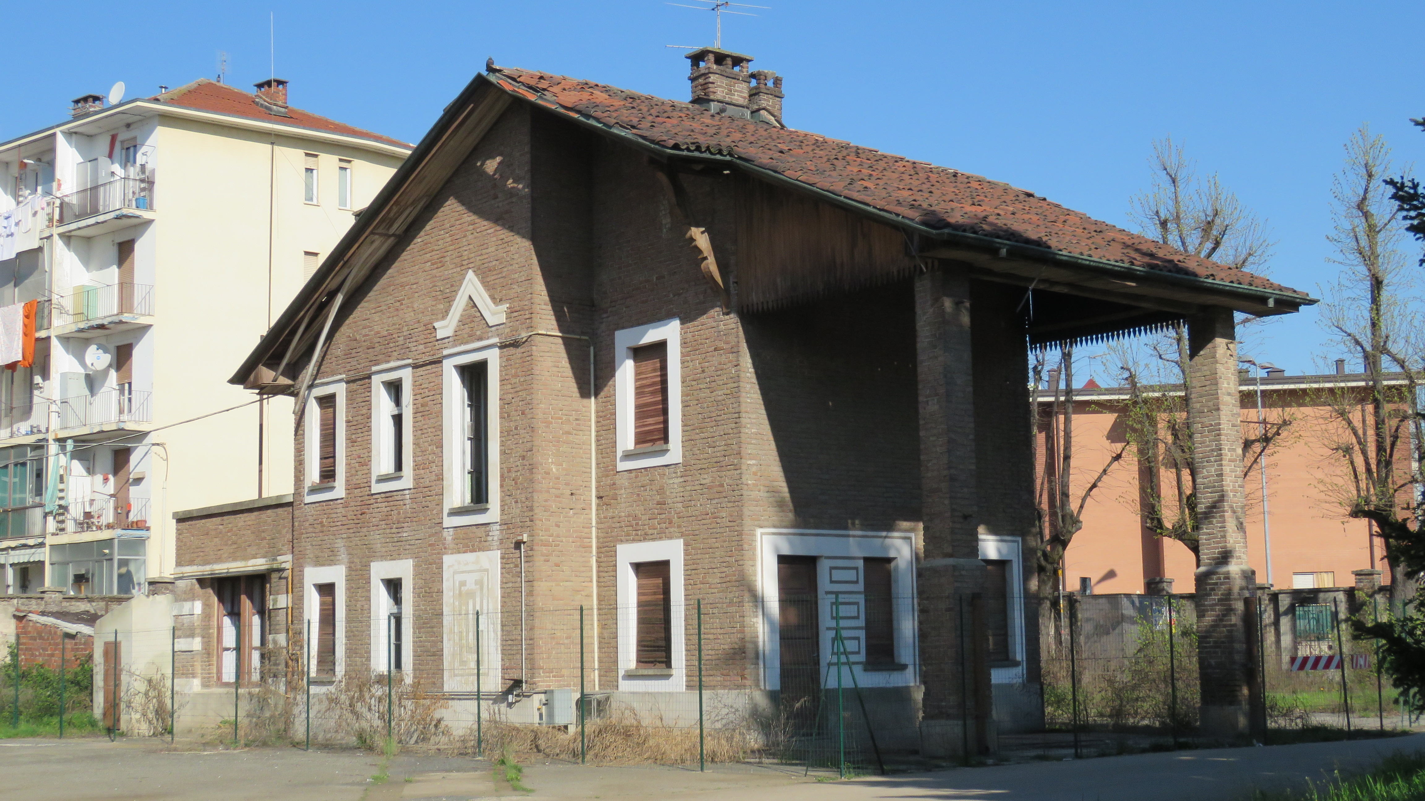 בניין המשטרה של המחנה בגרוליאסקו